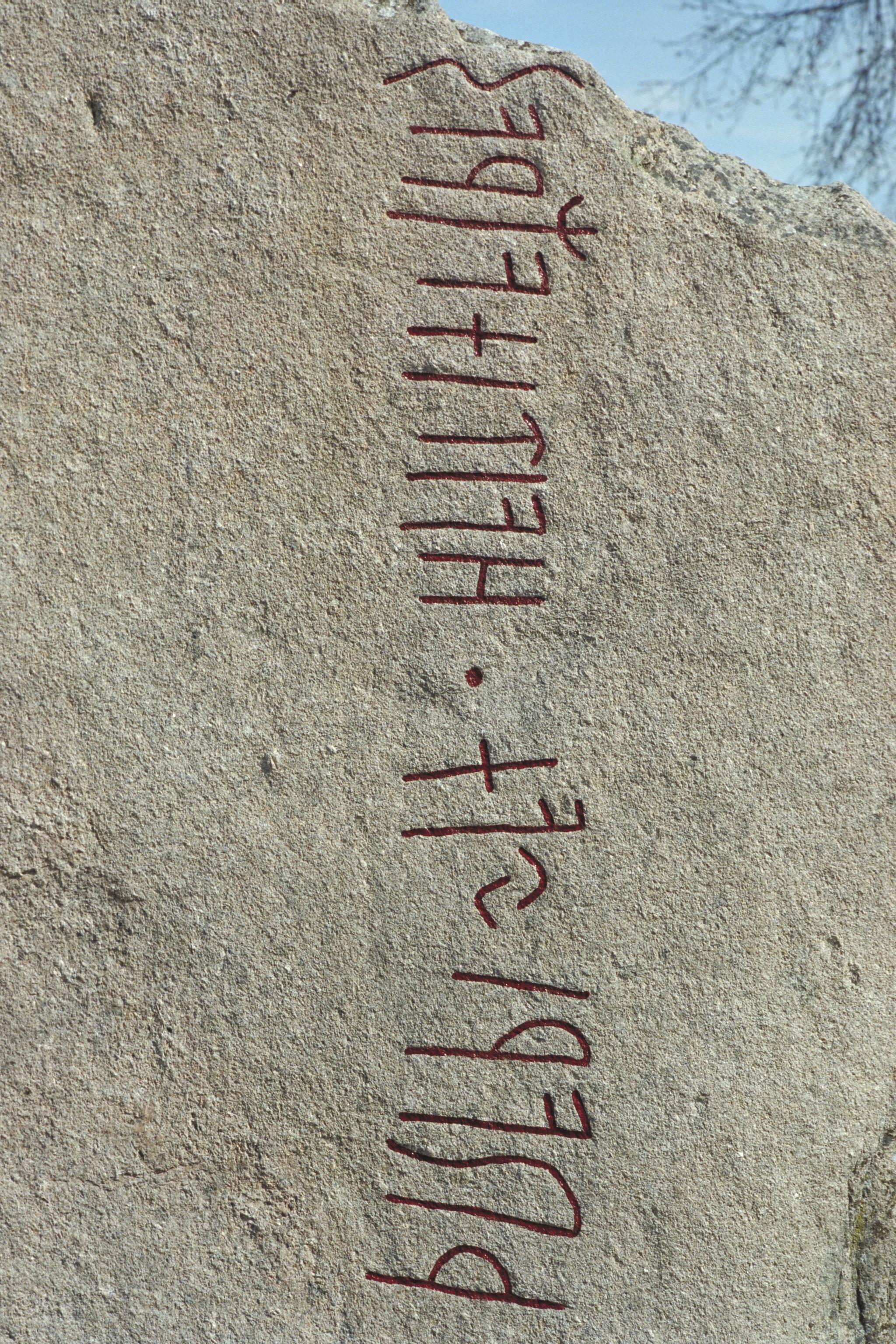 Inskriftens tolkning är omdiskuterad. Enligt en tolkning lyder den: Tråe var jag kallad vid namn. RAÄ-nummer Tanum 576:1 Motiv: Tanum Kallebystenen Nyckelord: Runor Kategori: Runristning/runsten Inskriftens tolkning är omdiskuterad. Enligt en tolkning lyder den: Tråe var jag kallad vid namn. RAÄ-nummer Tanum 576:1.